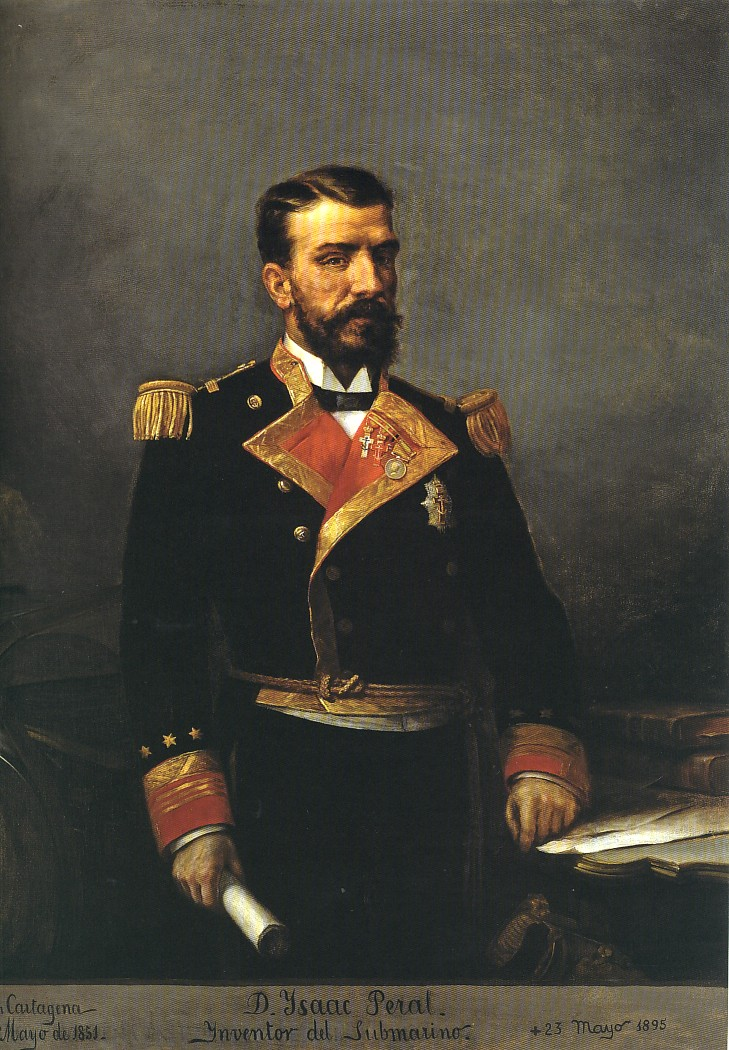 Retrato del científico, marino y militar español Isaac Peral (1851-1895), que fue teniente de navío de la Armada española y el inventor del primer submarino torpedero, conocido como el submarino Peral.